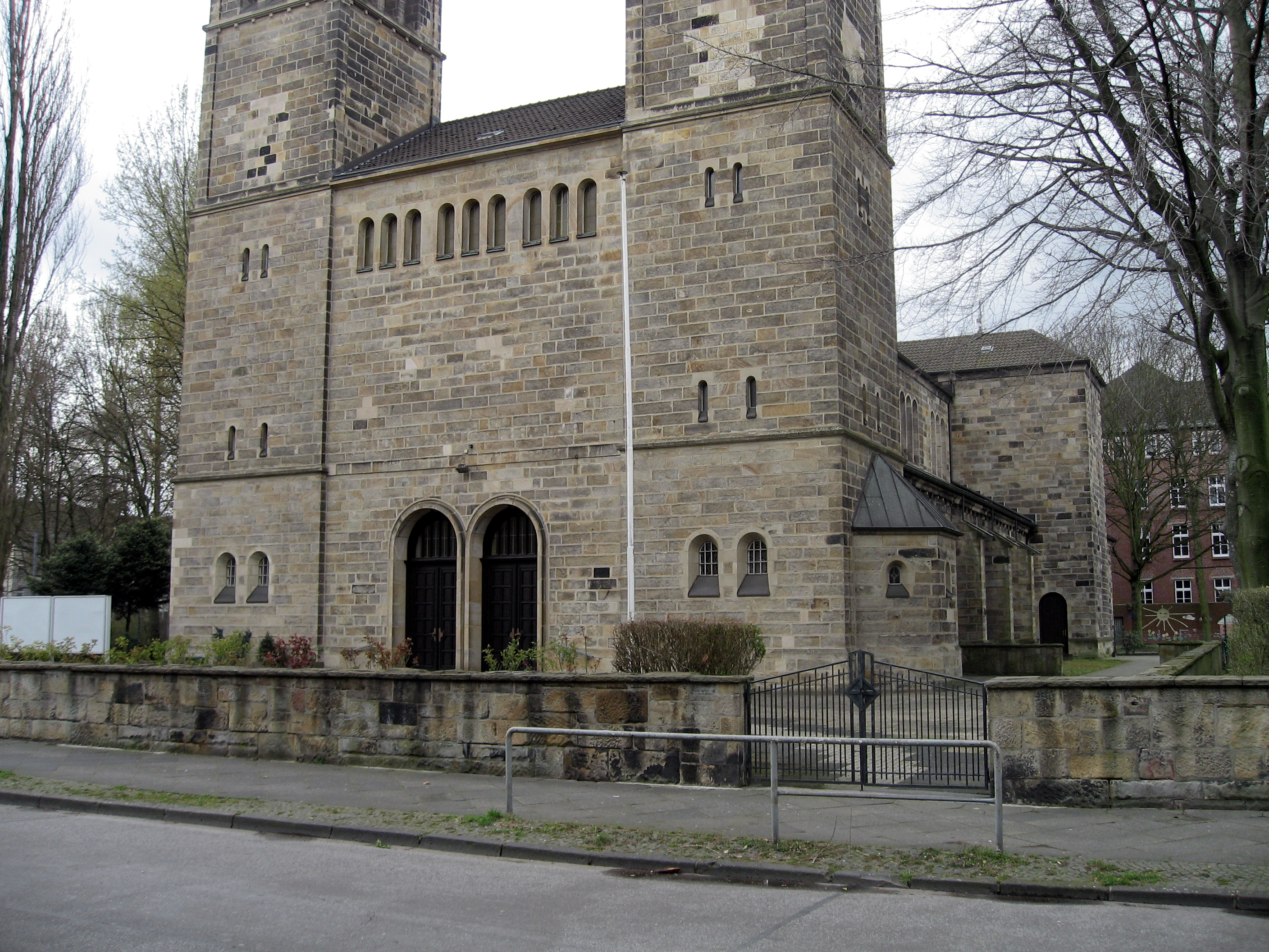 Dortmund, Nordstadt, Borsigplatzquartier, St. Dreifaltigkeitskirche, Flurstraße 10